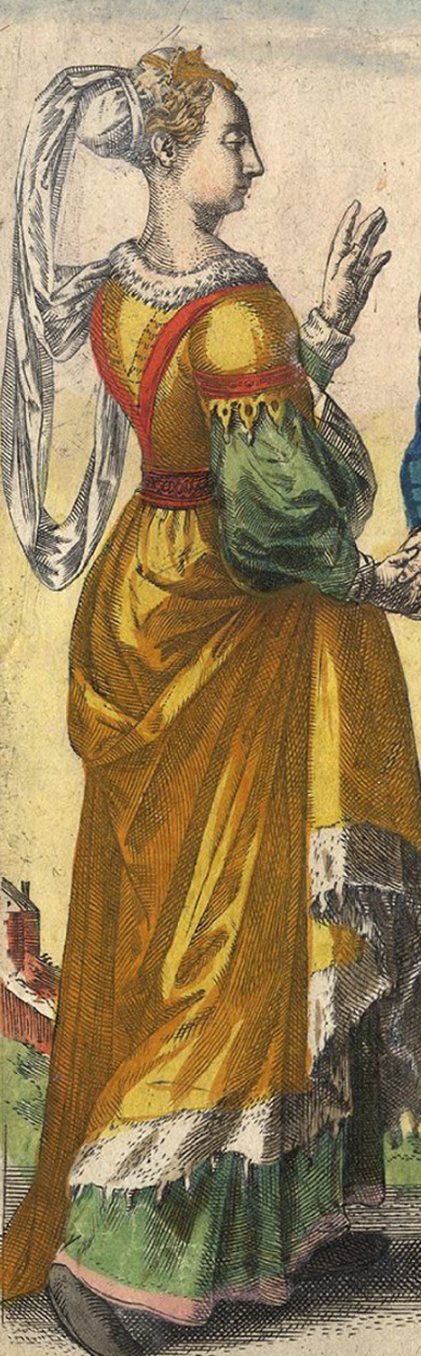 Mathilde de Béthune